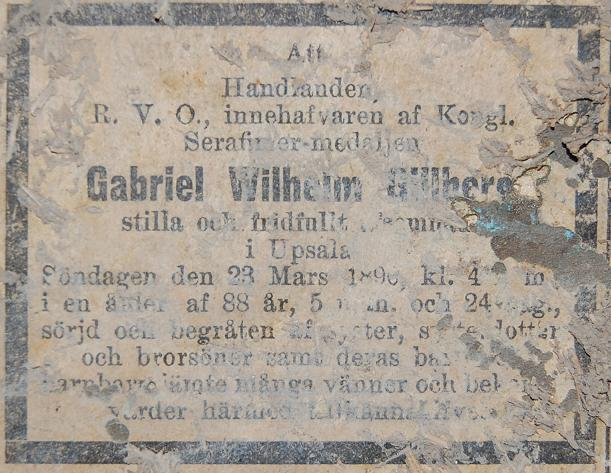 Dödsannons för Gabriel Wilhelm Gillberg från okänd tidning utgiven i slutet av mars 1890.